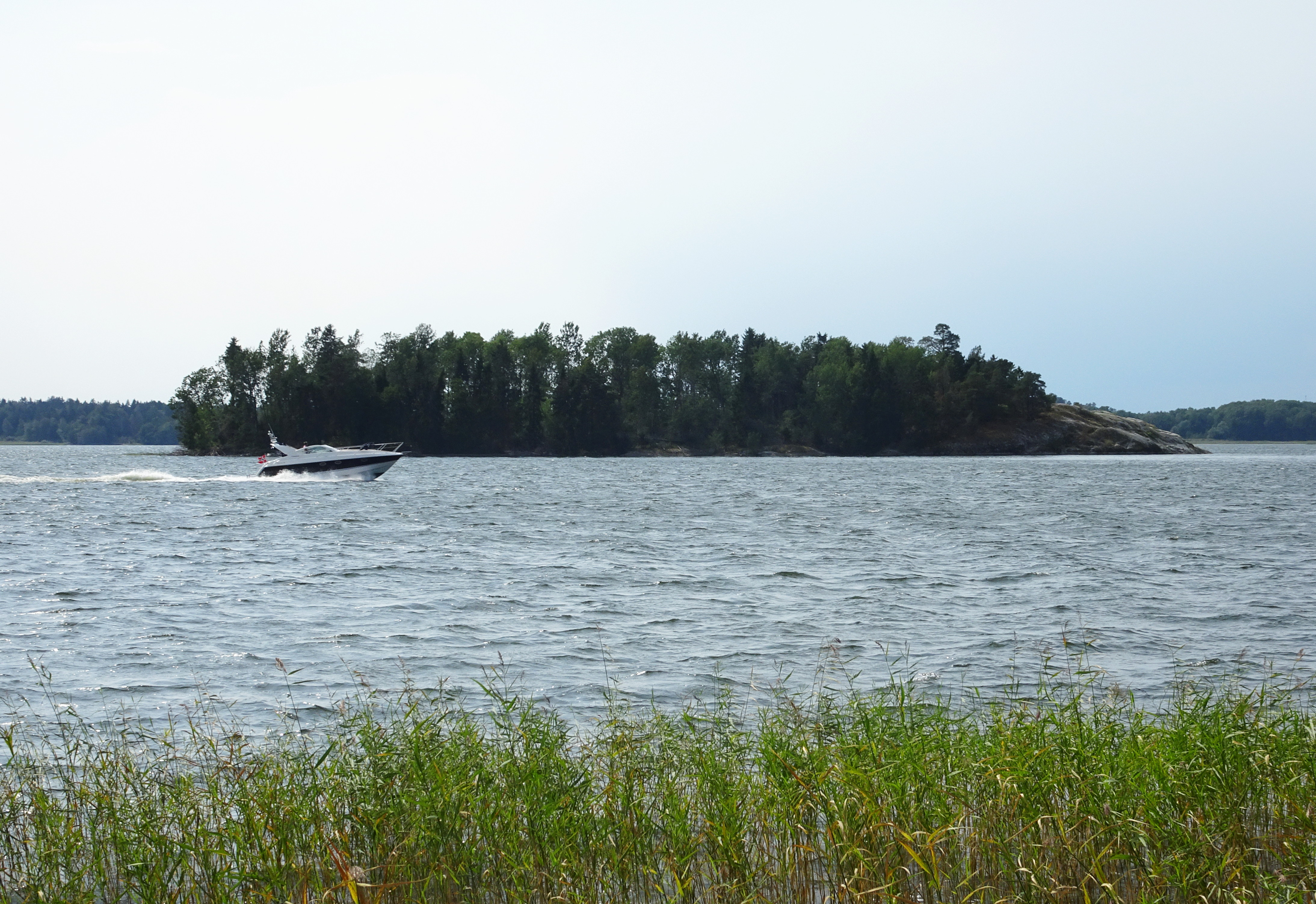 Rönnskär i Broknapparnas naturreservat